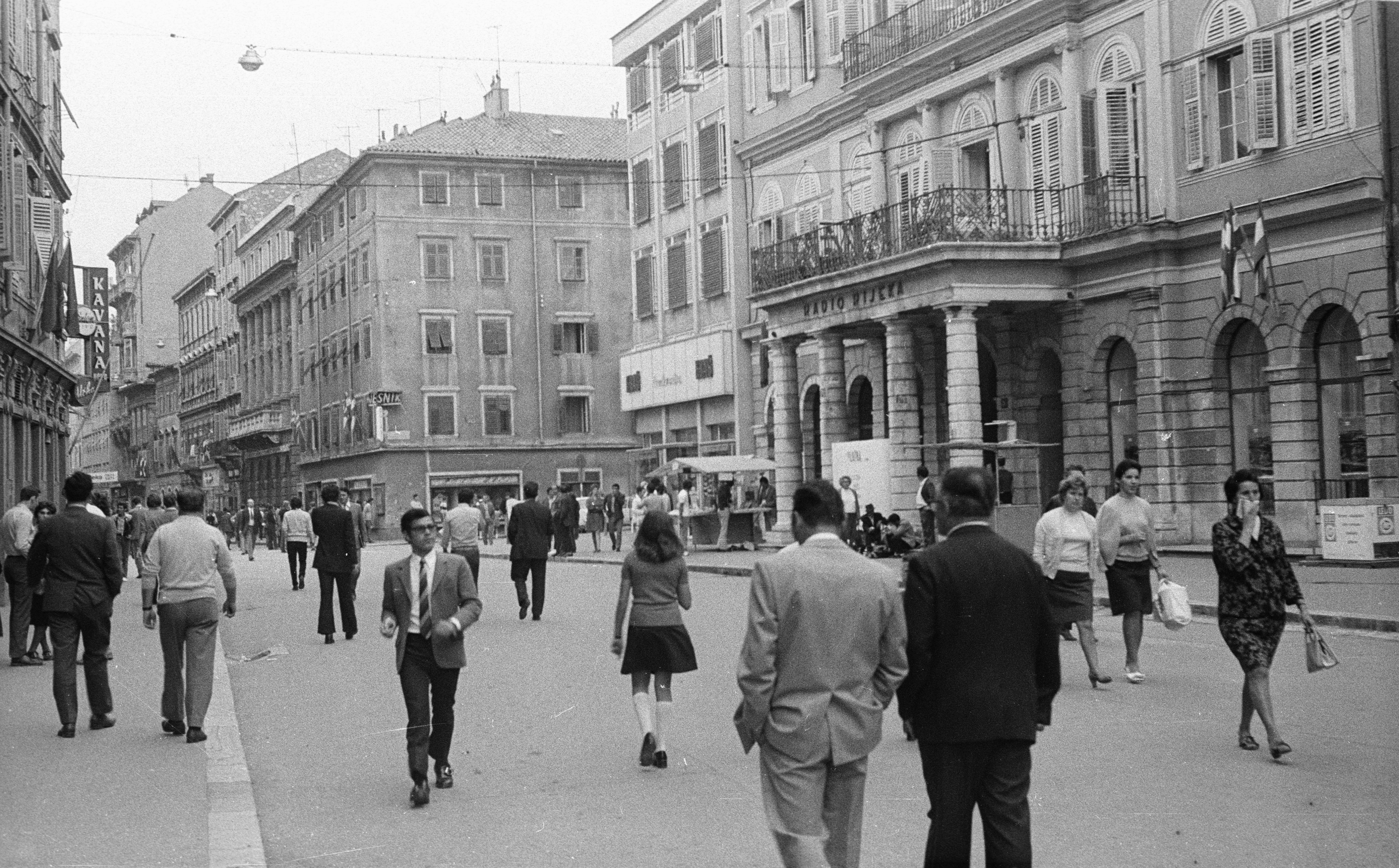 a Korzo, jobbra a régi Városháza (ma a Rádio Rijeka) épülete. Location: Croatia, Adriatic Sea, Rijeka Tags: street view, Yugoslavia Title: a Korzo, jobbra a régi Városháza (ma a Rádio Rijeka) épülete.